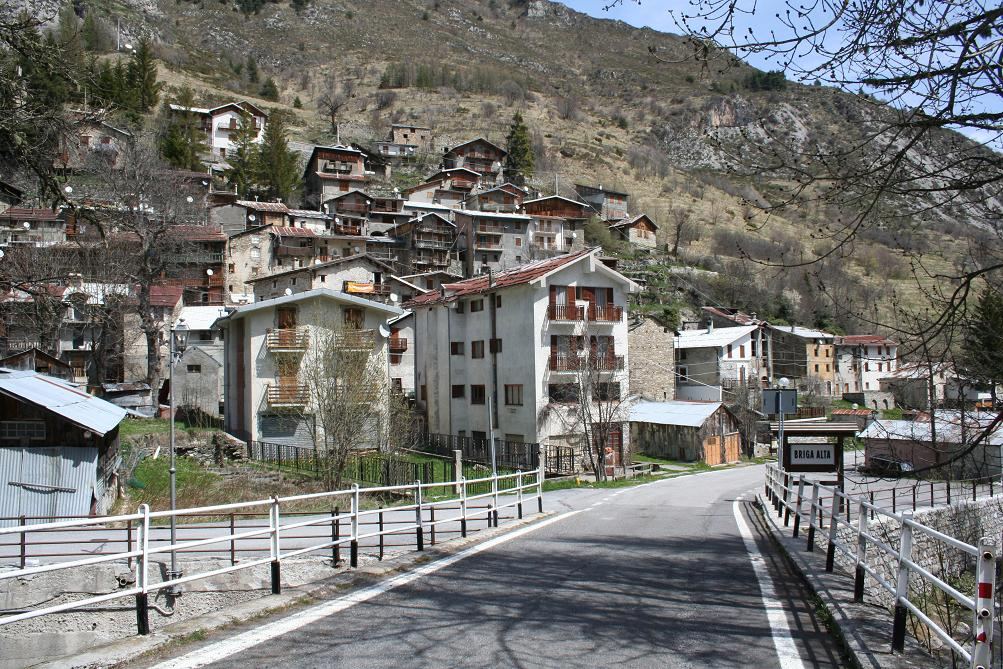 Upega, frazione di Briga Alta (CN) in val Tanaro. La foto è scattata sul ponte sul Tanarello al confine con la Liguria.